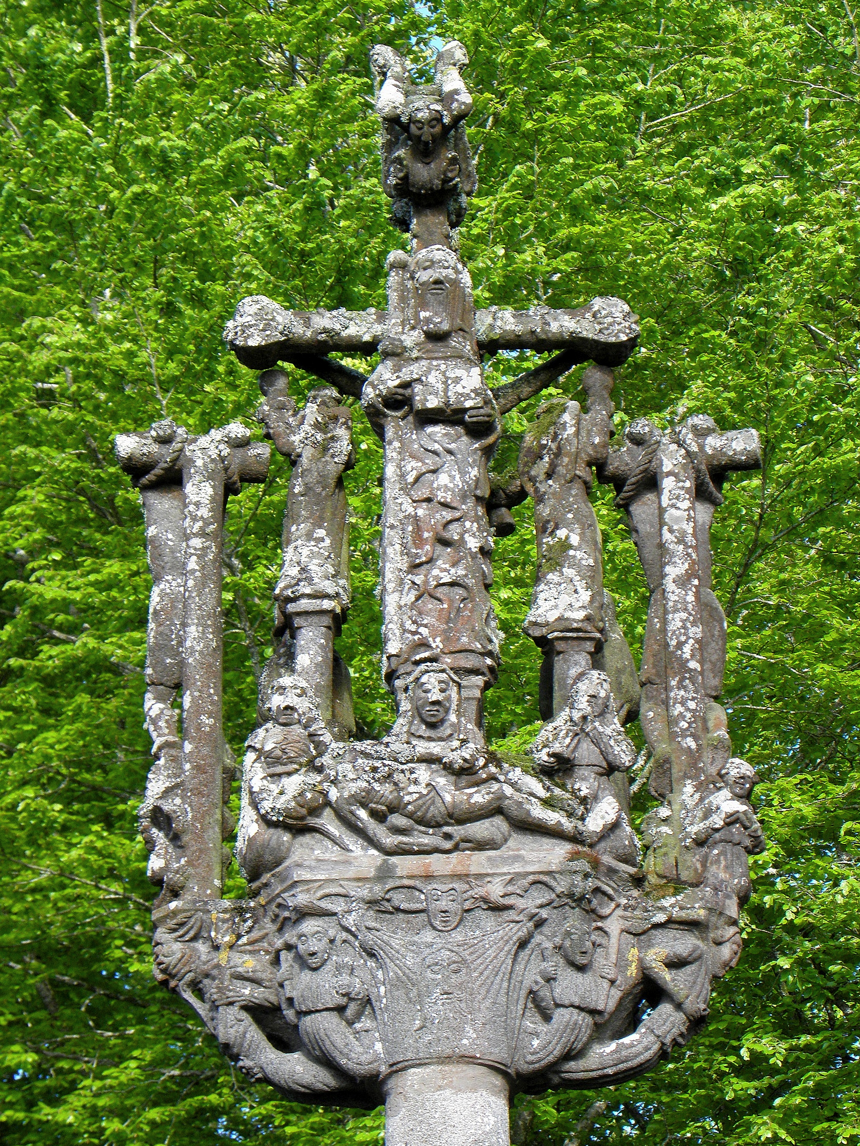 Calvaire de Saint-Herbot en Plonévez-du-Faou (29).